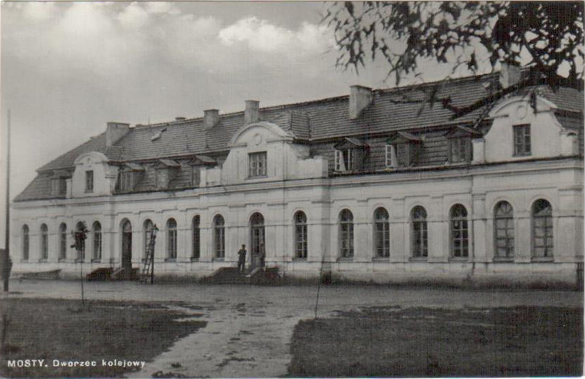 Беларуская (тарашкевіца): Масты (Masty), вуліца Вакзальная (vulica Vakzalnaja). Чыгуначная станцыя